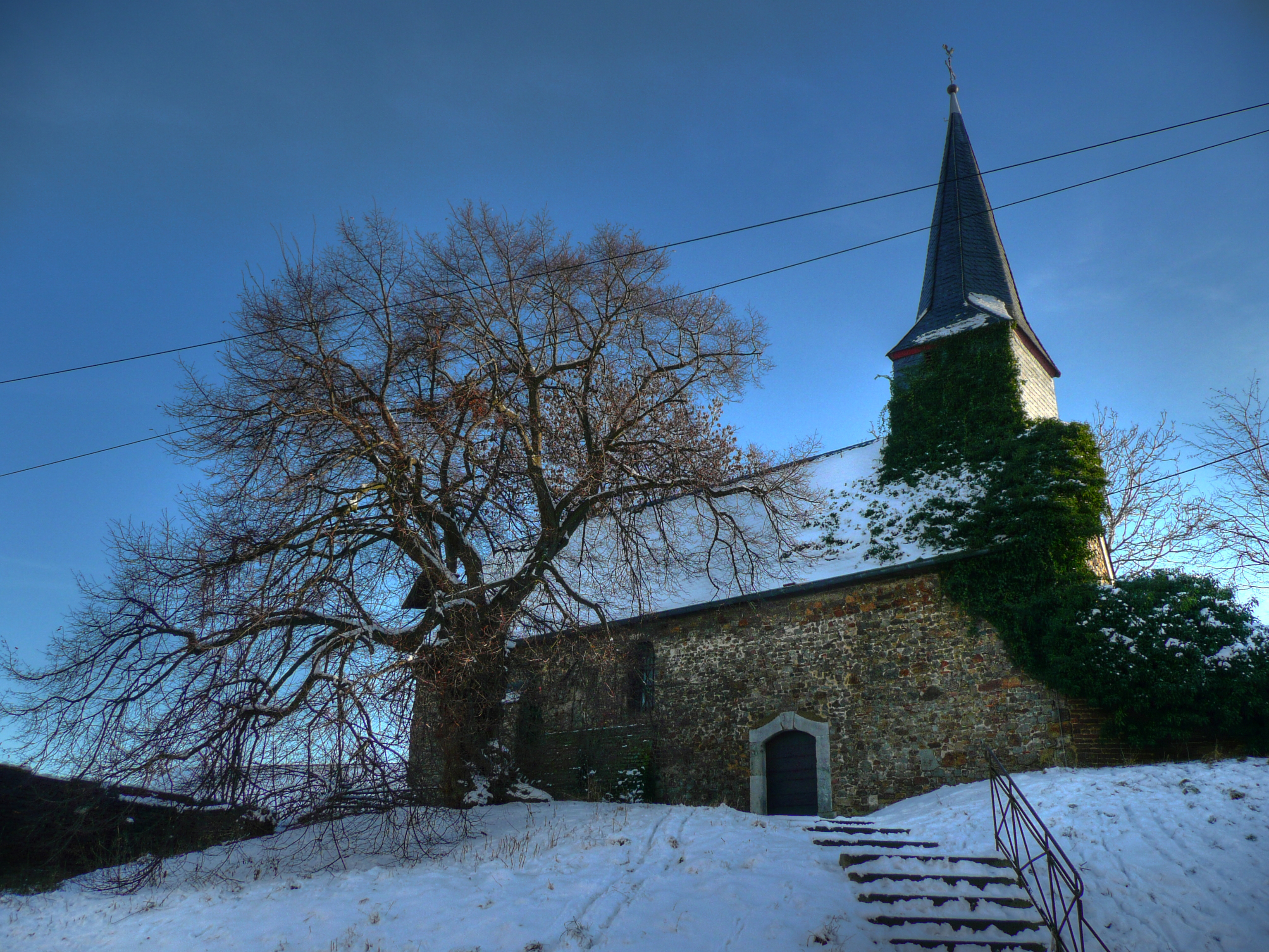 Helena-Kapelle in Vilvenich (zu Pier zugehörig)